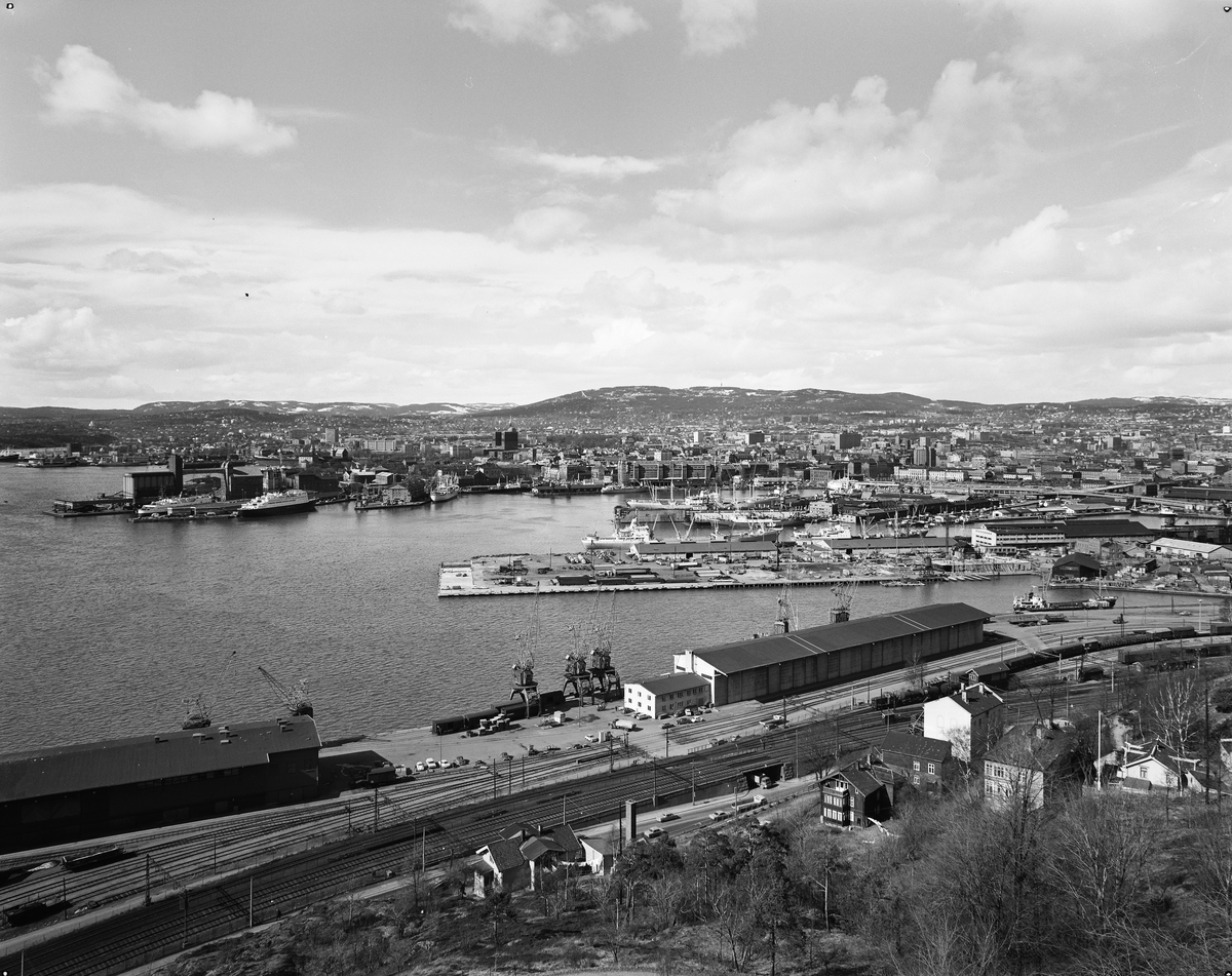 Grønlikaia i Oslo 1969, med bebyggelsen i Grønlia i forgrunnen. Sørengkaia, Bjørvika og Vippetangen lenger bak.